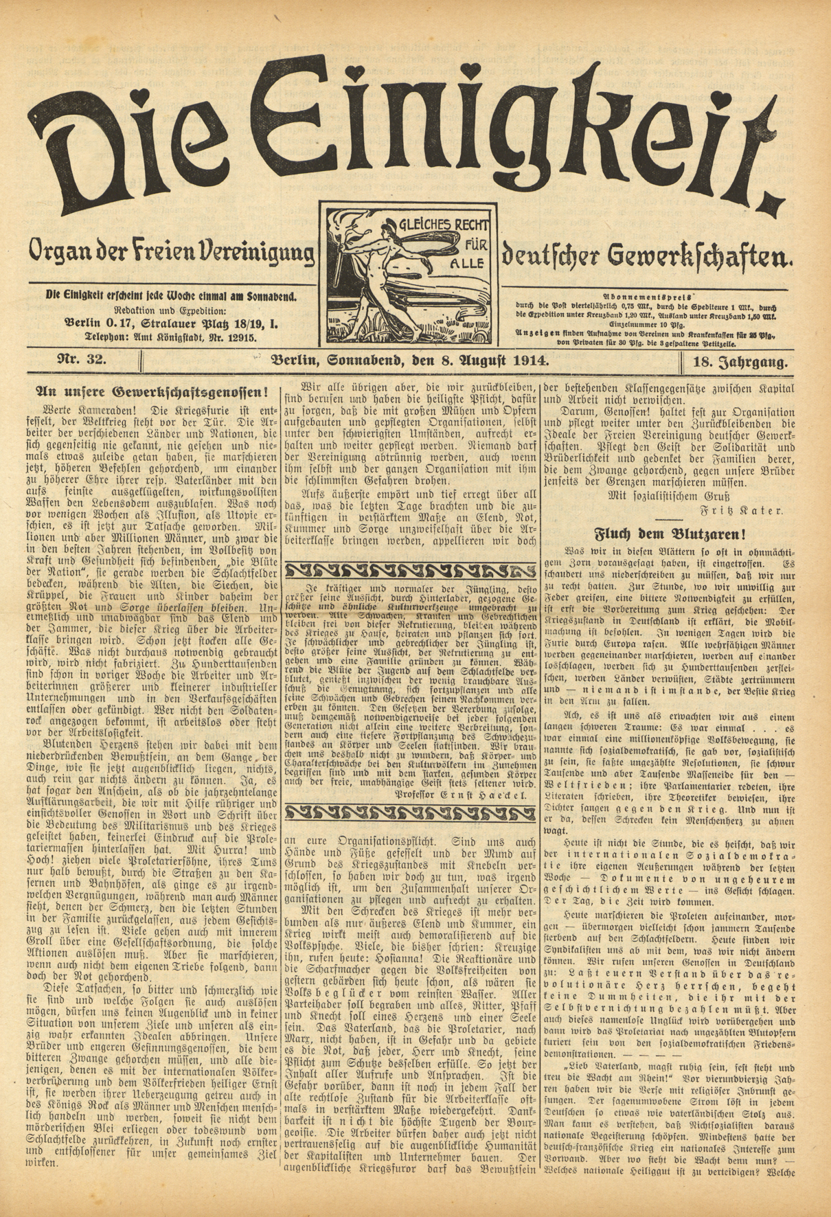 August 8, 1914 edition of Einigkeit